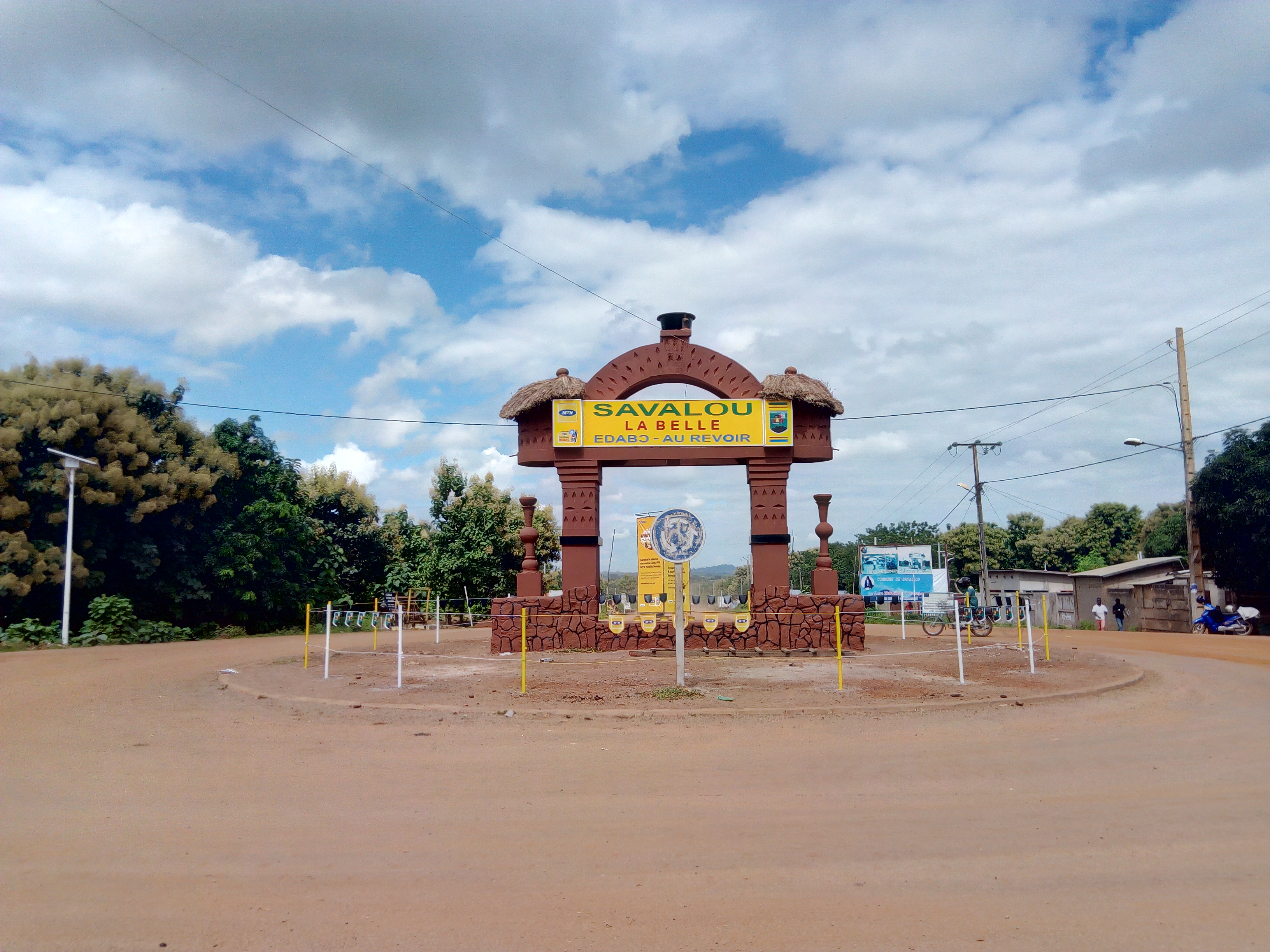 Palais royal de Savalou Wikidata has entry Q66436547 with data related to this item.